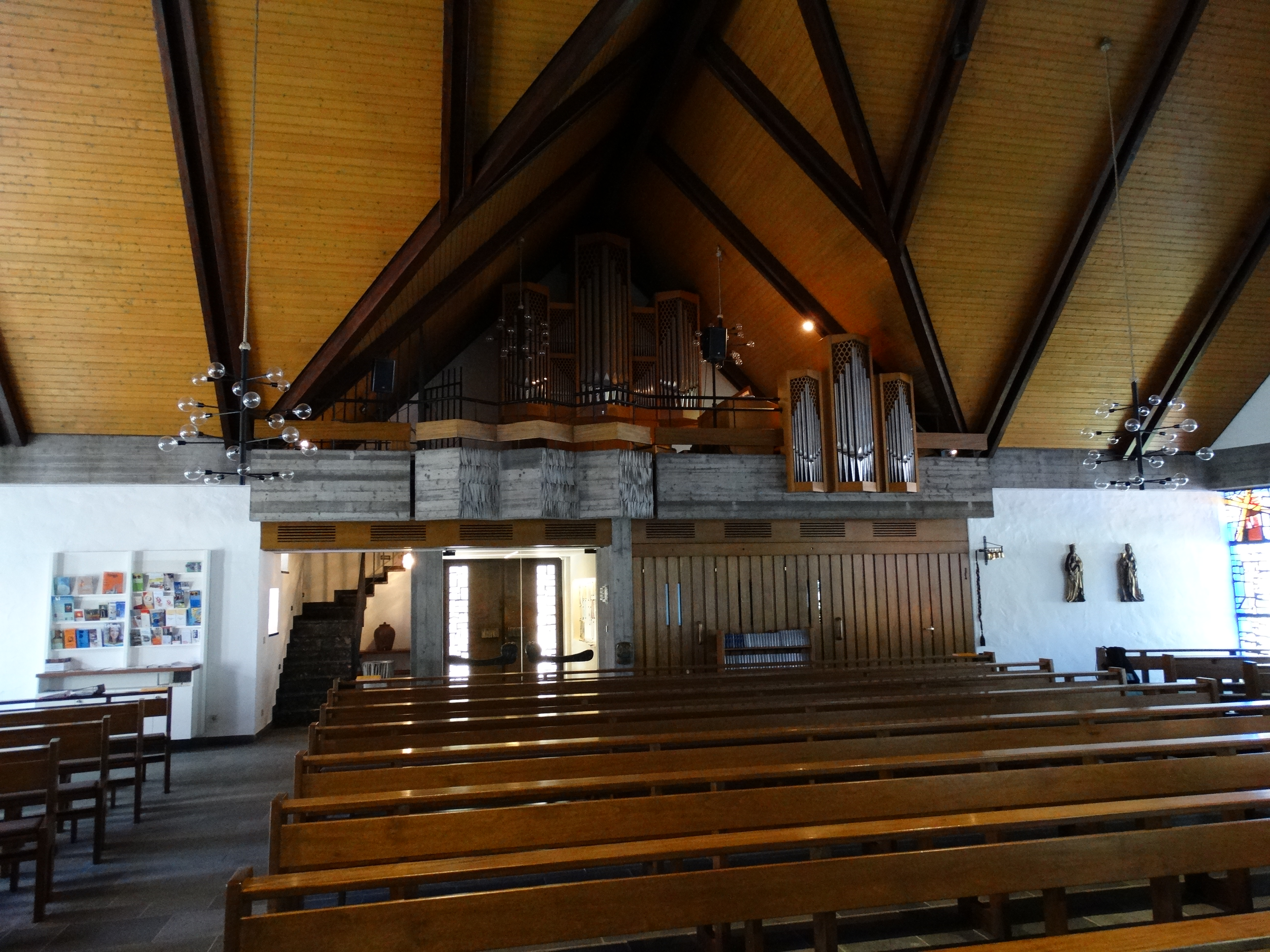 St. Piuskirche Hof, Blick in das Kirchenschiff